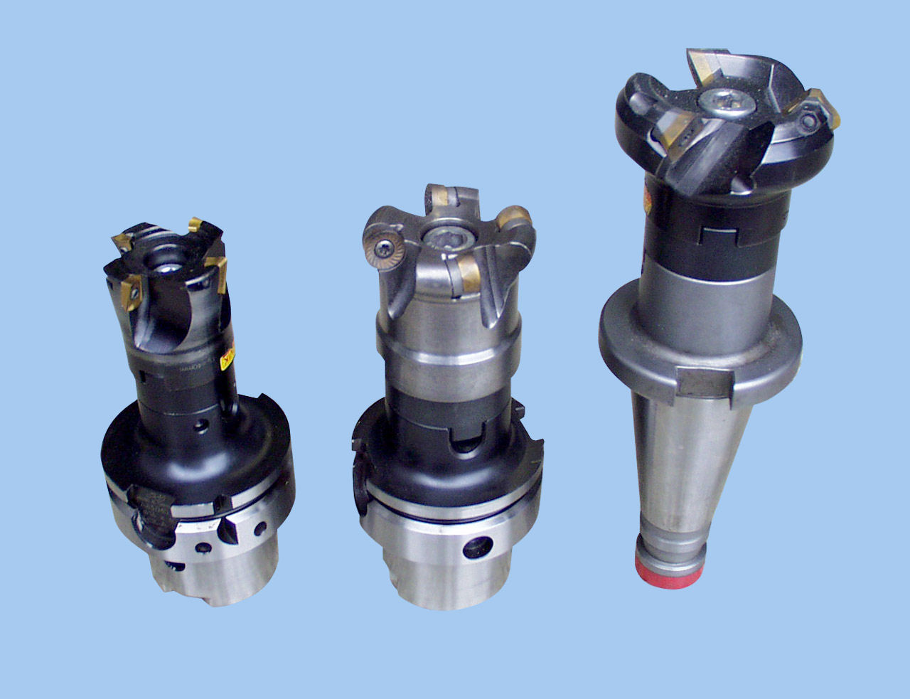 milling cutter